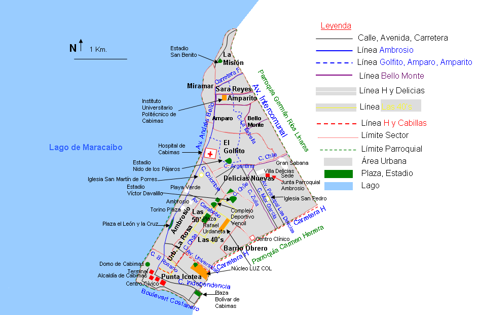 Mapa de la Parroquia Ambrosio, Municipio Cabimas, Zulia, Venezuela